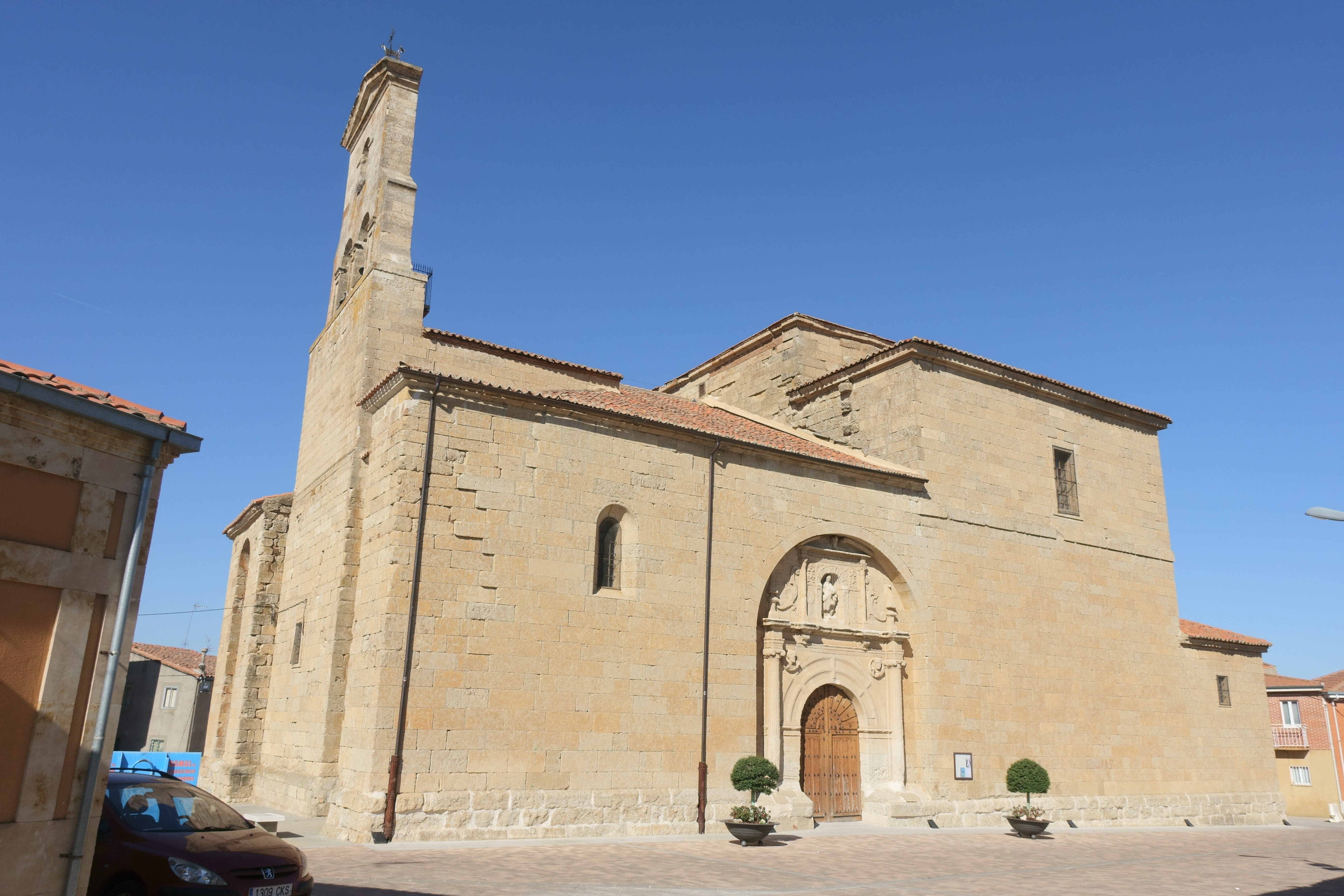 Iglesia de San Juan Bautista, Fuentesaúco (Zamora, España).